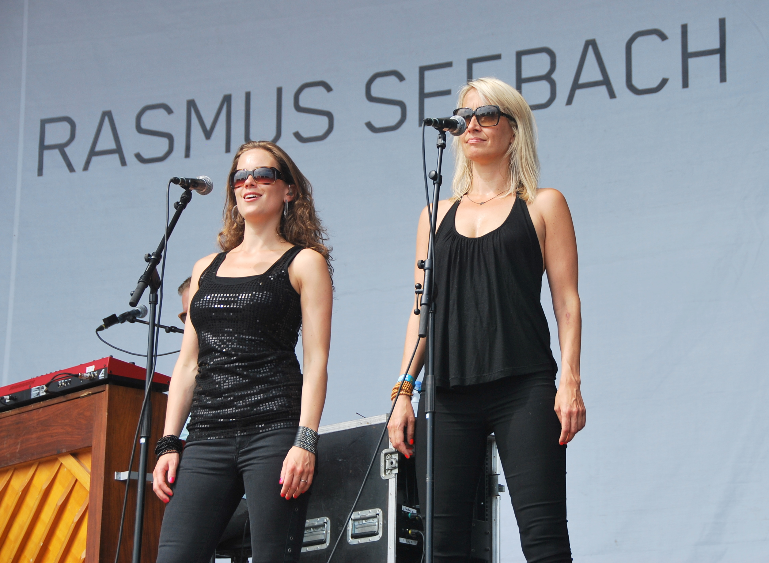 Rasmus Seebachs korpiger under en koncert på Vig Festival 2010.